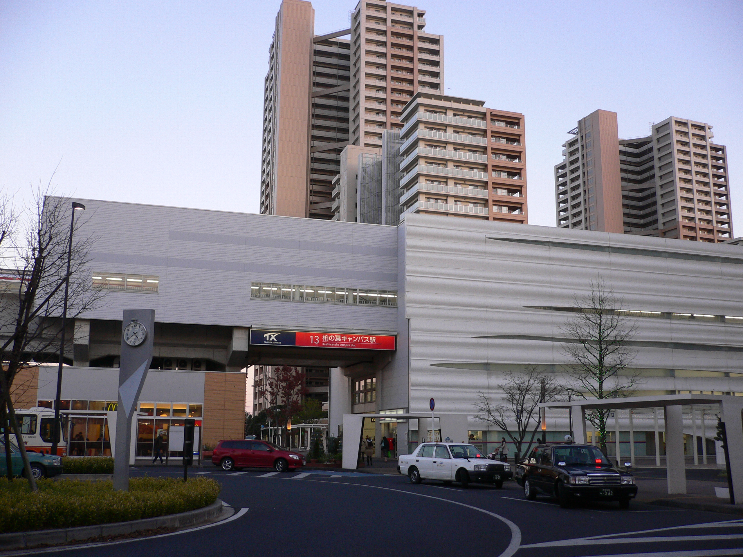 つくばEx.柏の葉キャンパス駅